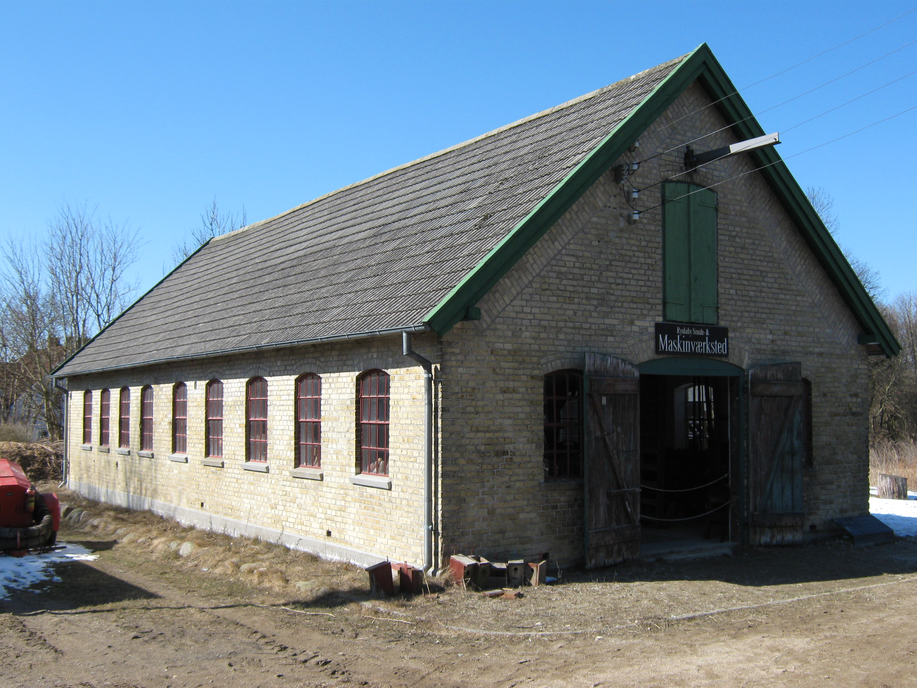 Smedeværksted fra Rynkeby. Frilandsmuseet.